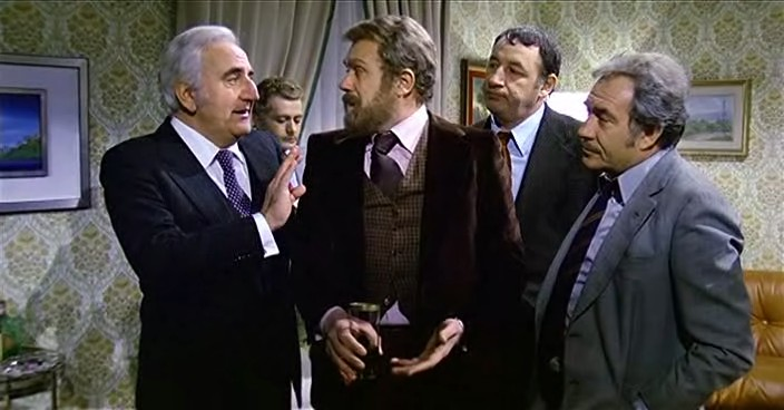 Screenshot del film Amici miei (1975) di Mario Monicelli.